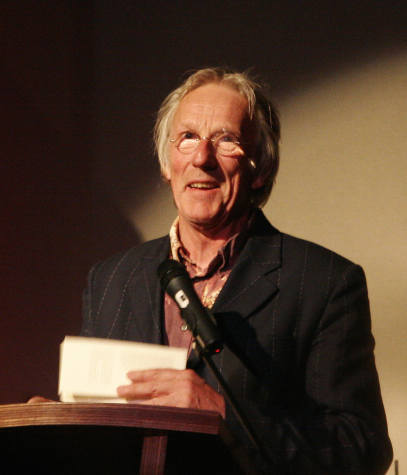 Freek de Jonge spreekt in Studio/K